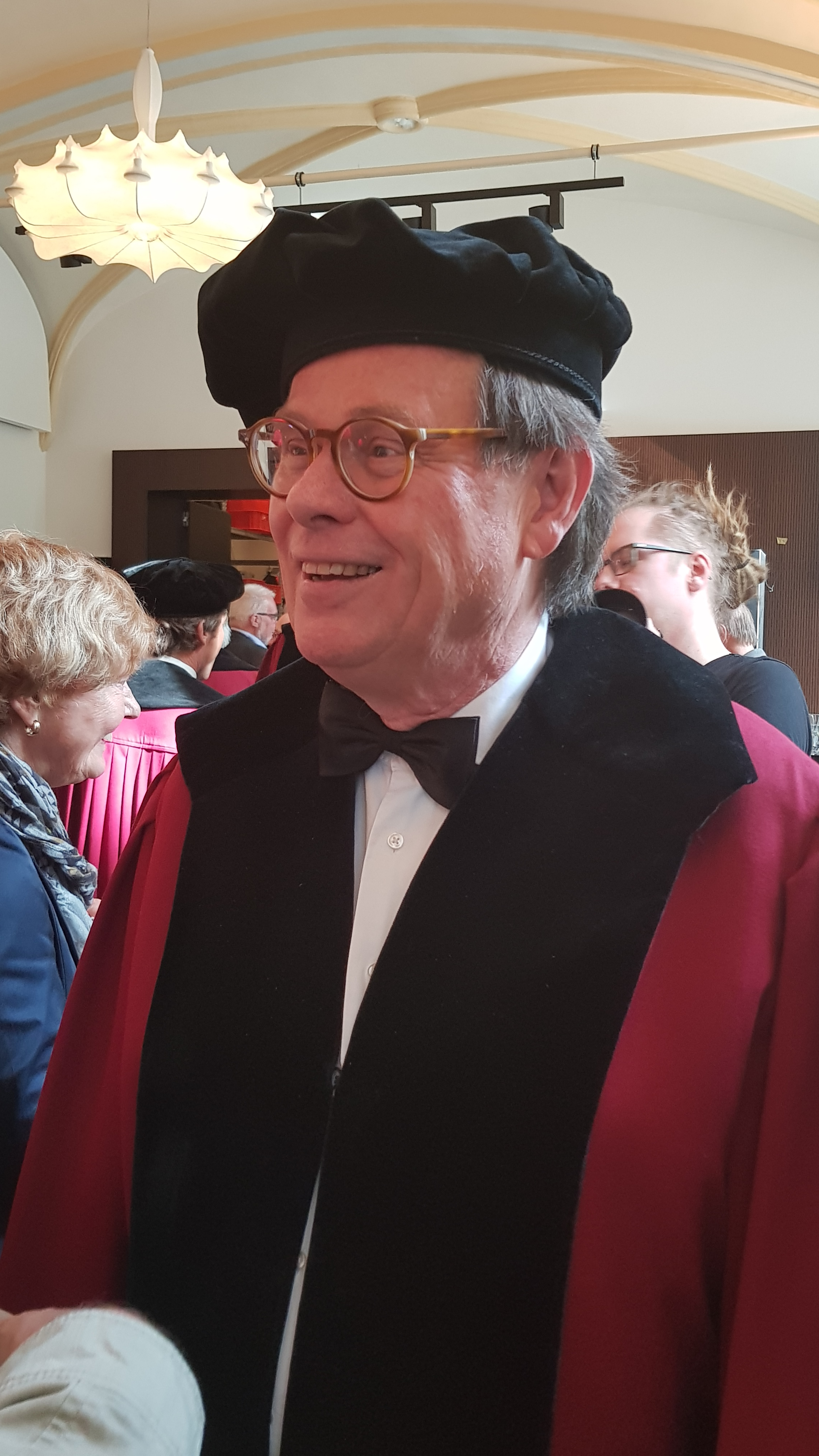 Ernst Homburg tijdens de receptie na zijn afscheid van de Universiteit Maastricht